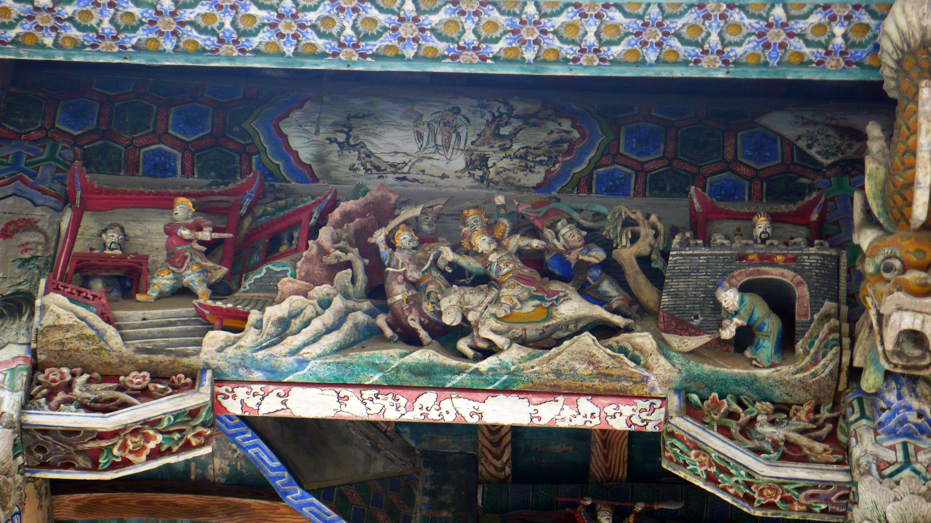 花戏楼木雕，空城计。